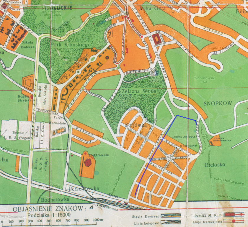 Репродукція ділянки карти Львова у частині Нового Львова, 1931. Розмір 840х770 пікселів.